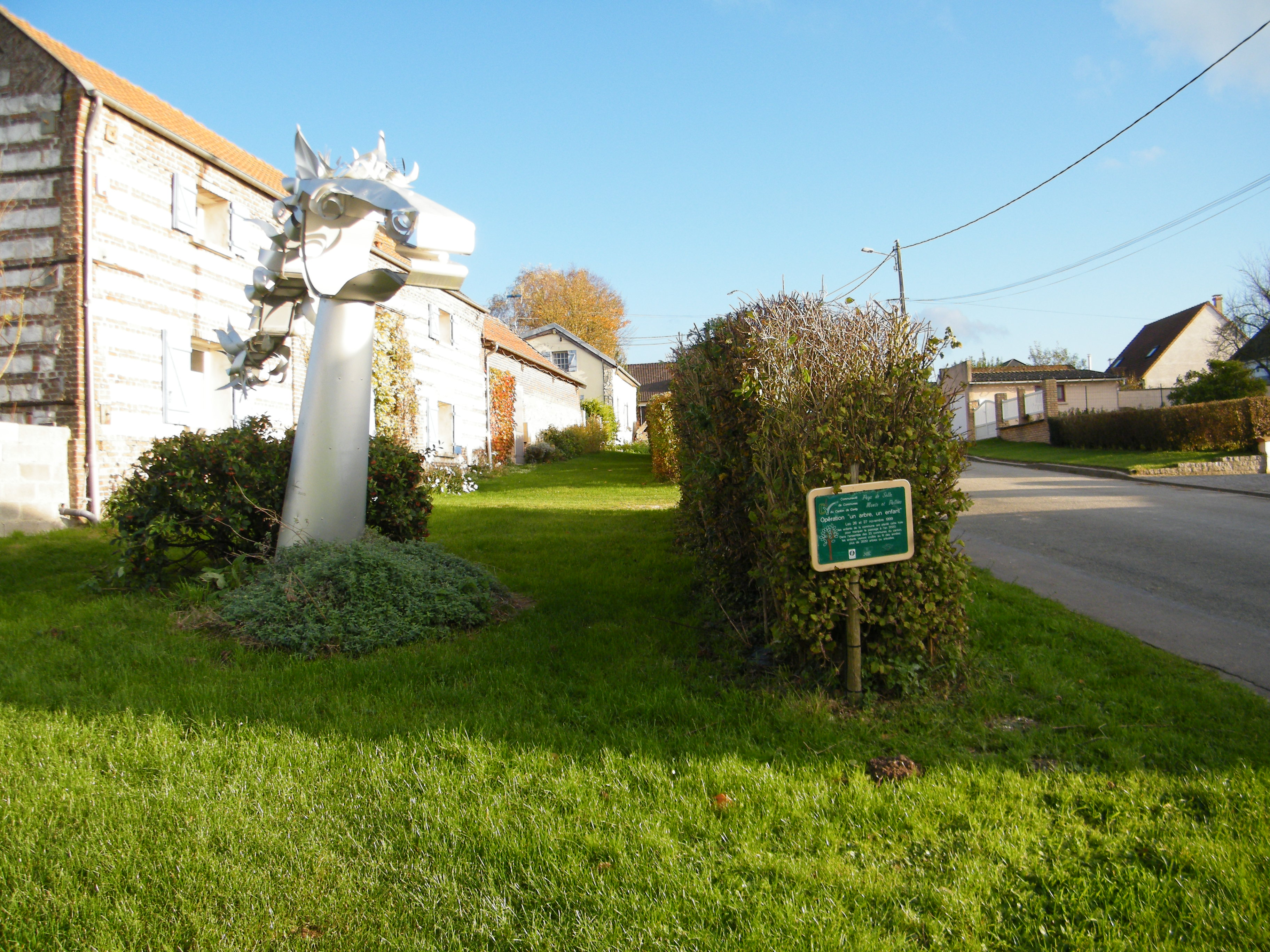 Sculpture moderne en bordure de voirie.